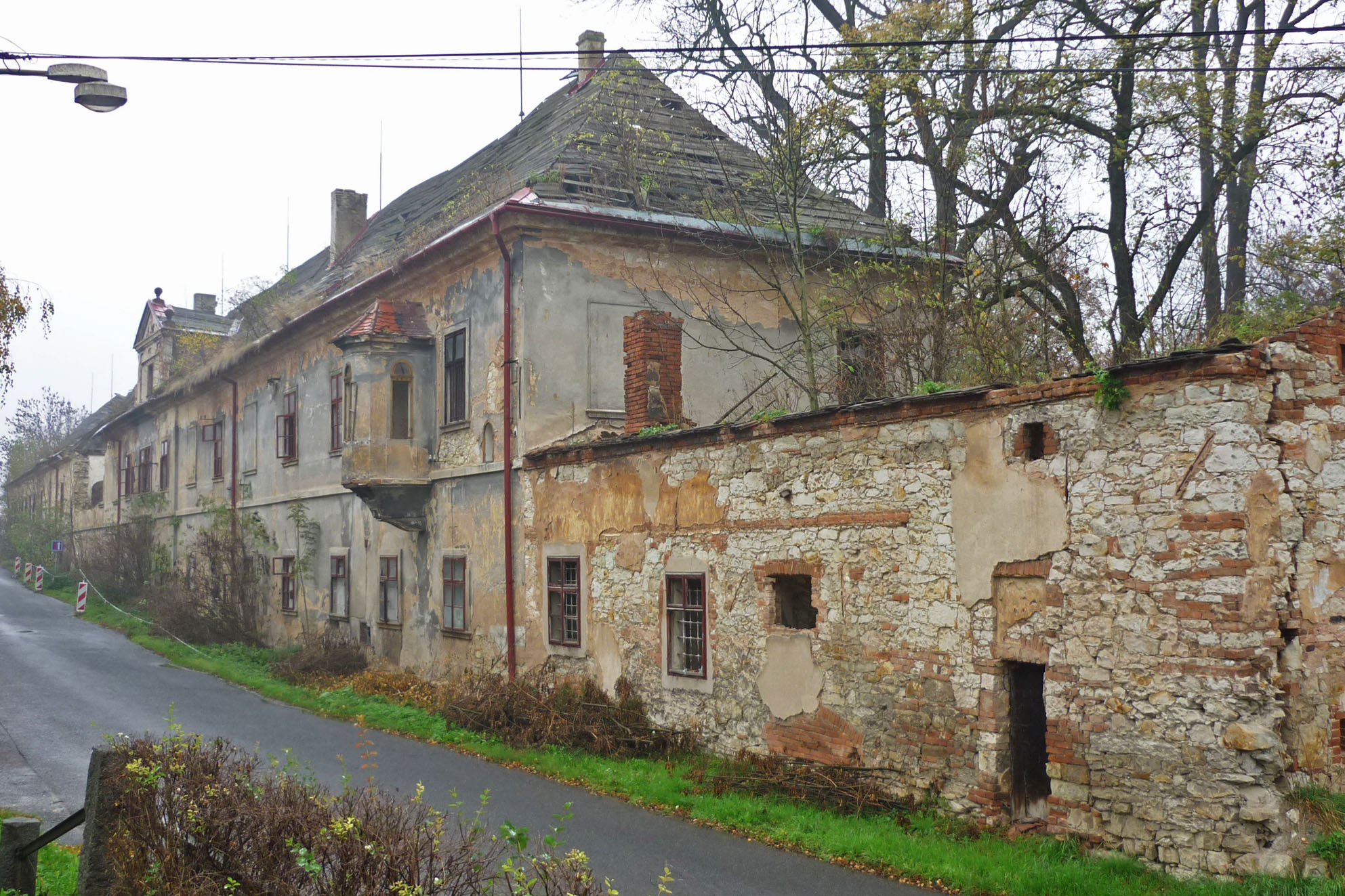 Dobříčany, Zámek čp. 1